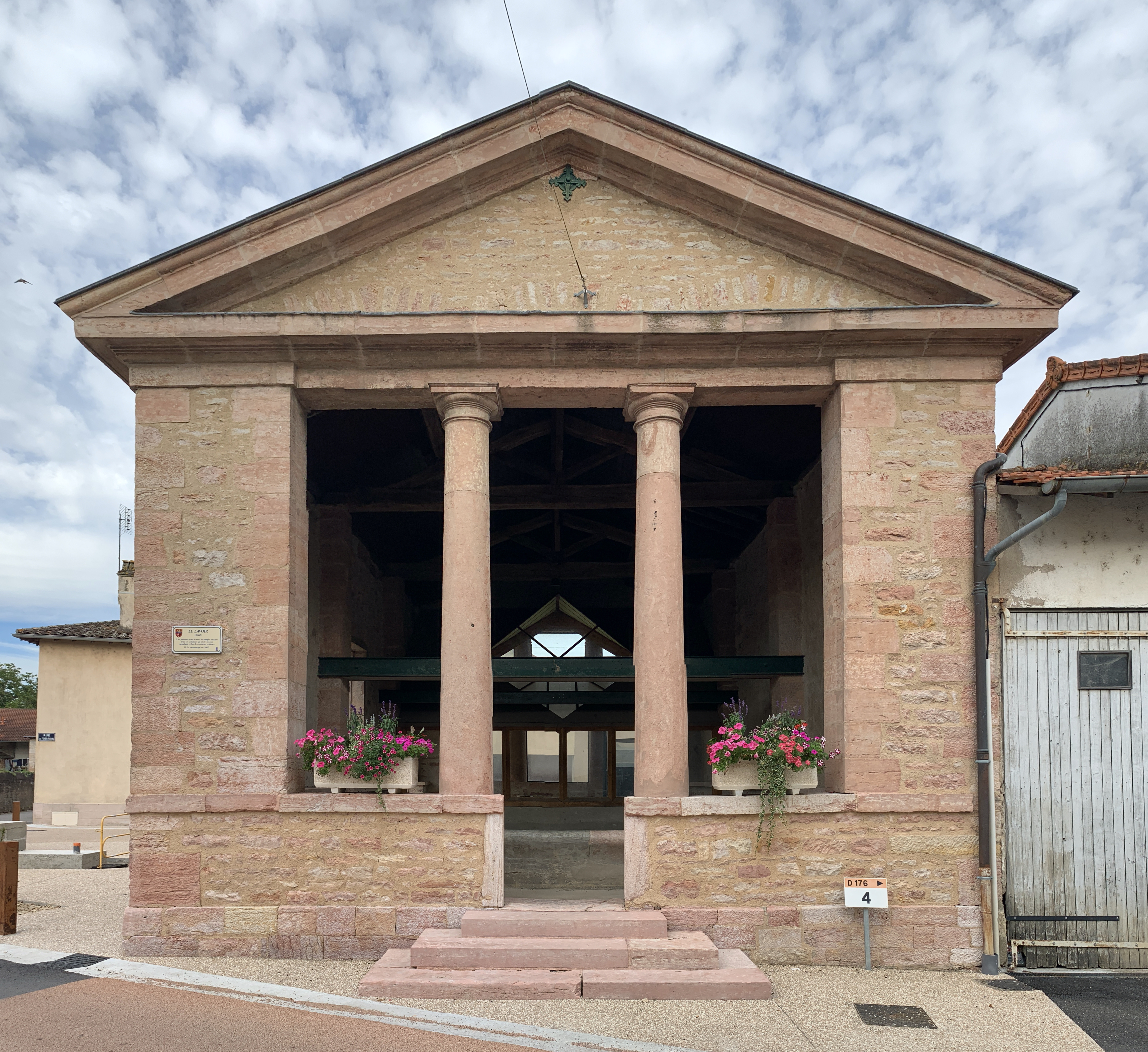 Lavoir du Bourg de Préty.